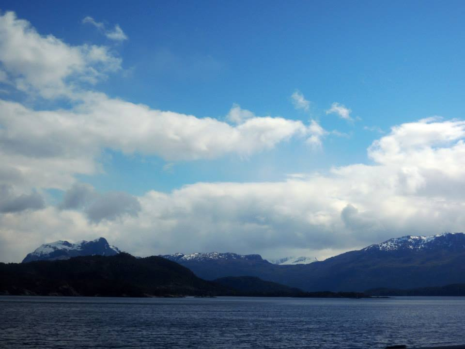 Utsikt til fjorden